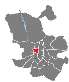 Viser Chamberí i rødt.